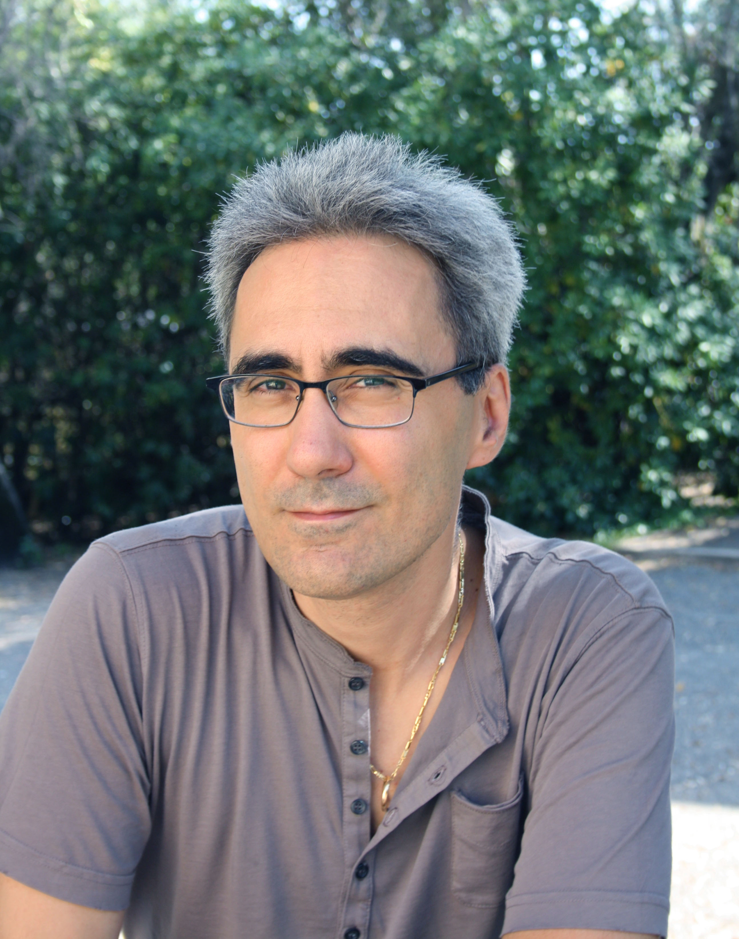 Foto di Marcello Rossi